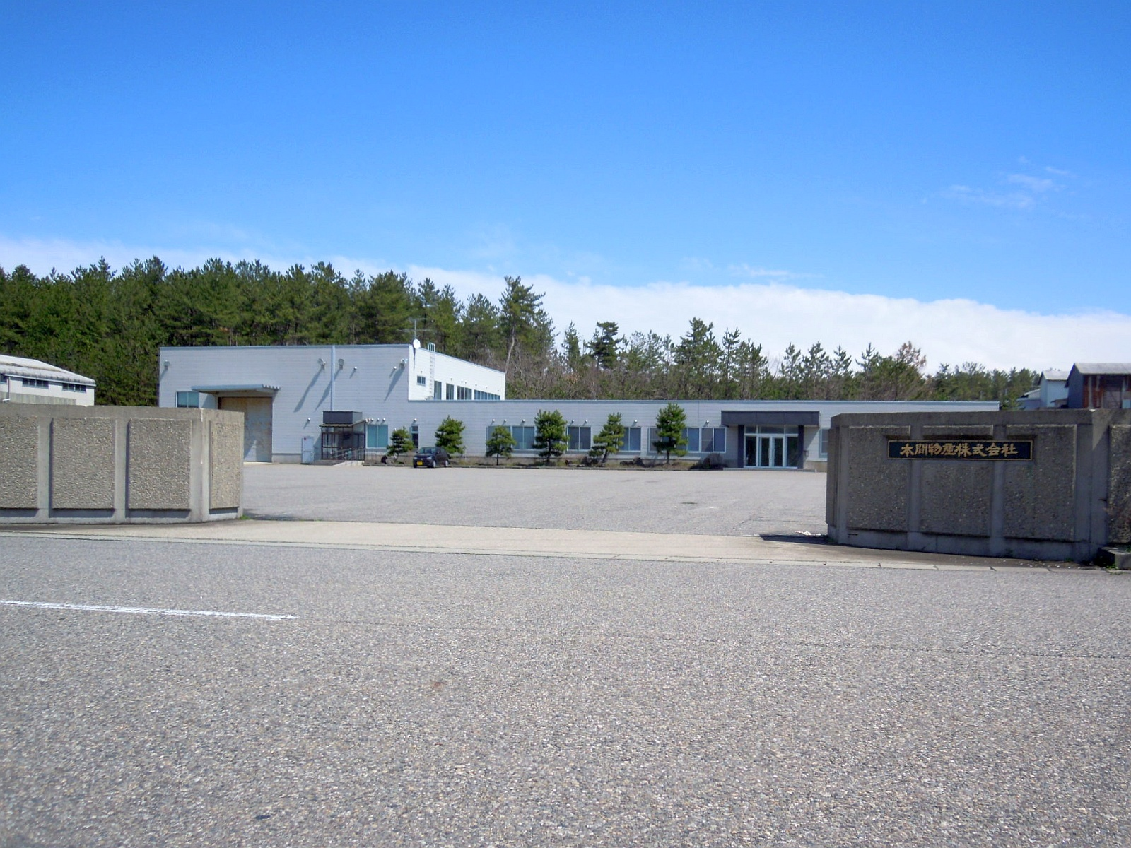 山形県飽海郡遊佐町にある本間物産本社。